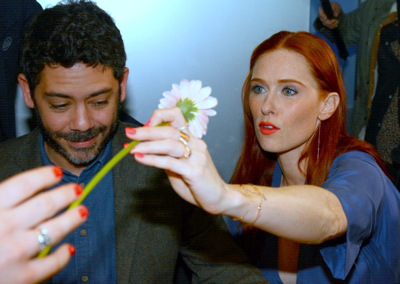 Manu Payet et Audrey Fleurot à l'ouverture du Printemps du cinéma à l'UGC La Défense